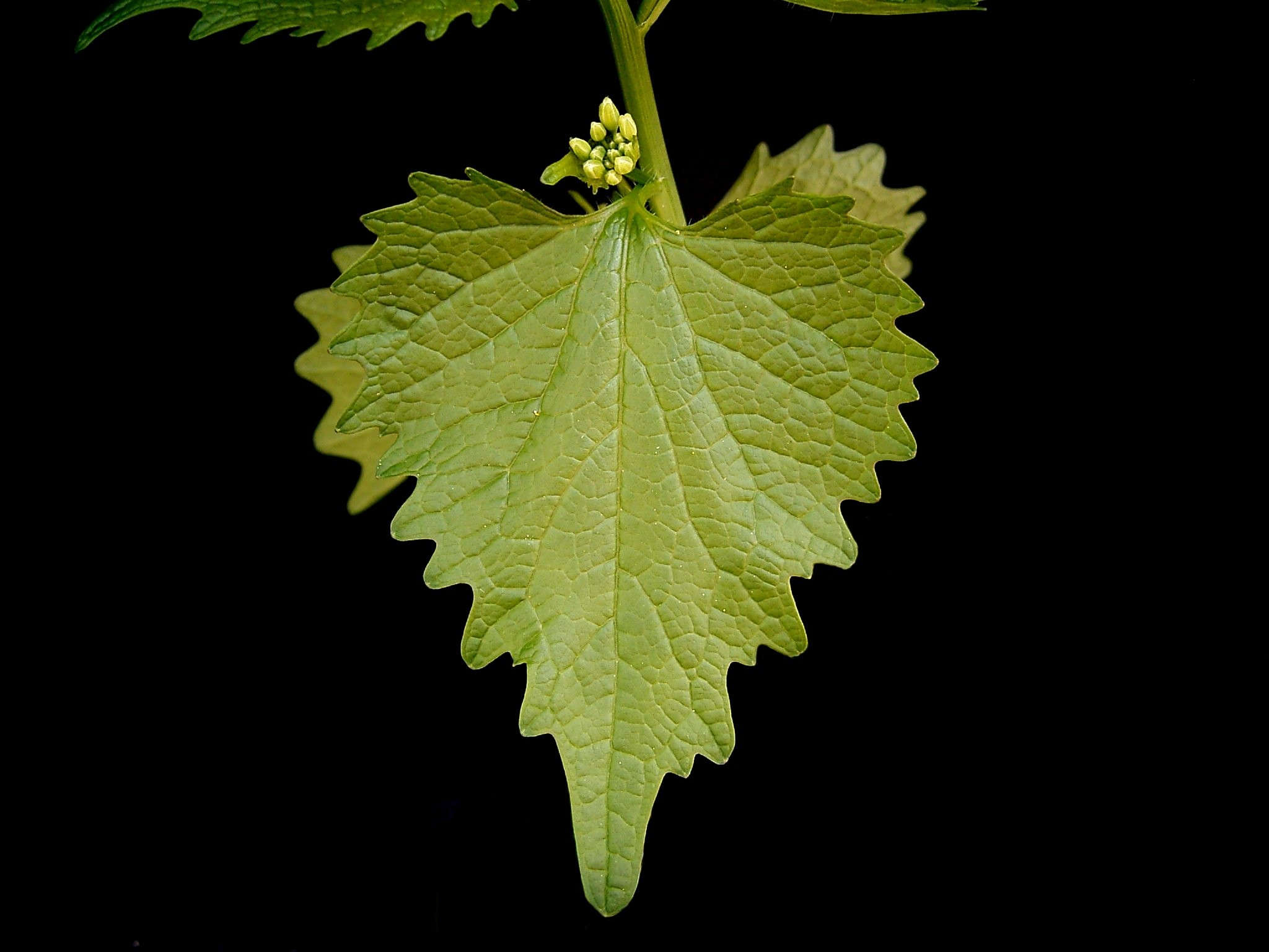 Alliaria petiolata